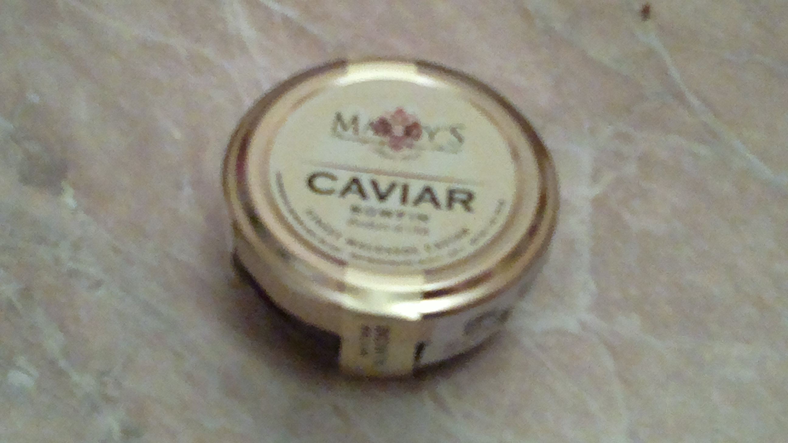 Баночка икра рыбы бофин